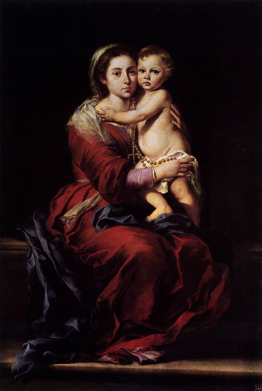 La obra representa a la Virgen María llevando al Niño Jesús sobre sus rodillas y un rosario.